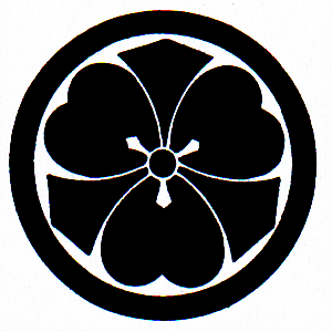 日本の家紋